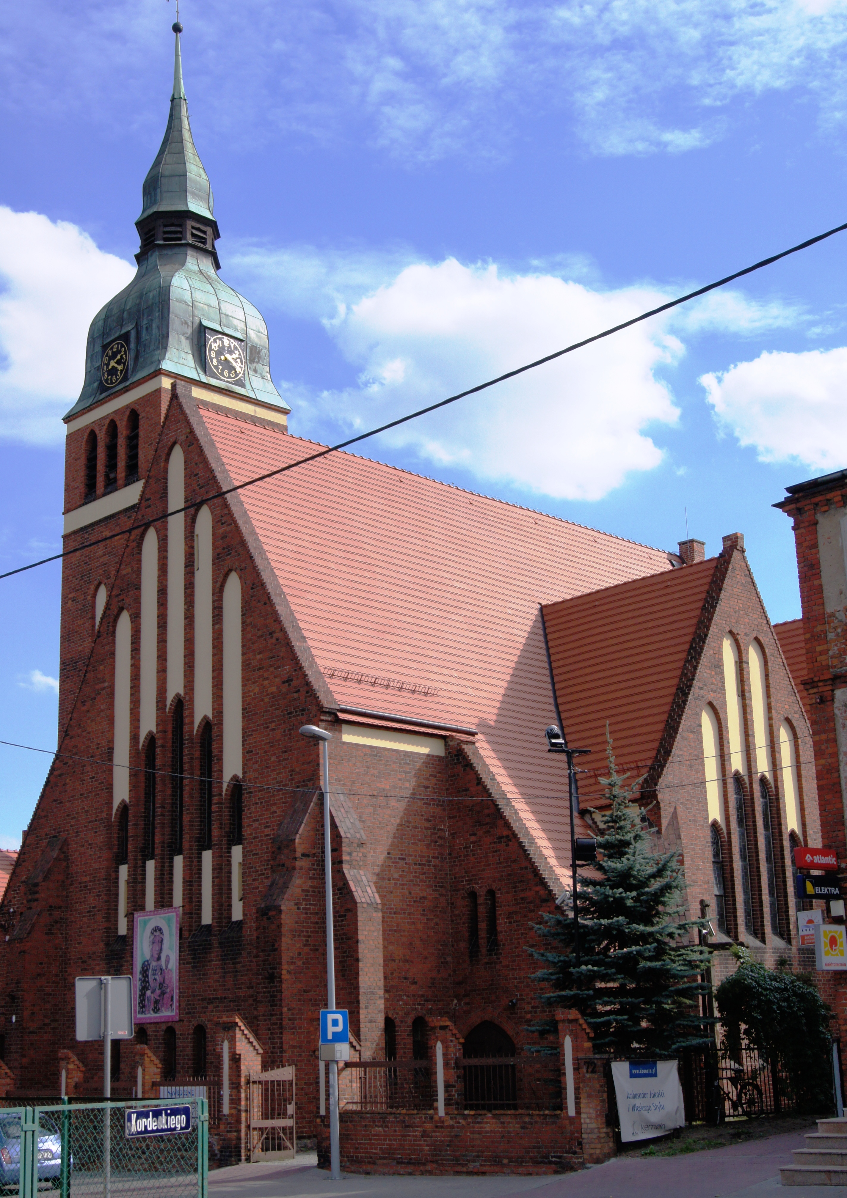 Toruń, ul. Podgórna - Kościół Matki Boskiej Zwycięskiej, dawniej ewangelicki p.w. św. Jerzego (Ola Z., zabytek nr rejestr. A/64/1-2)